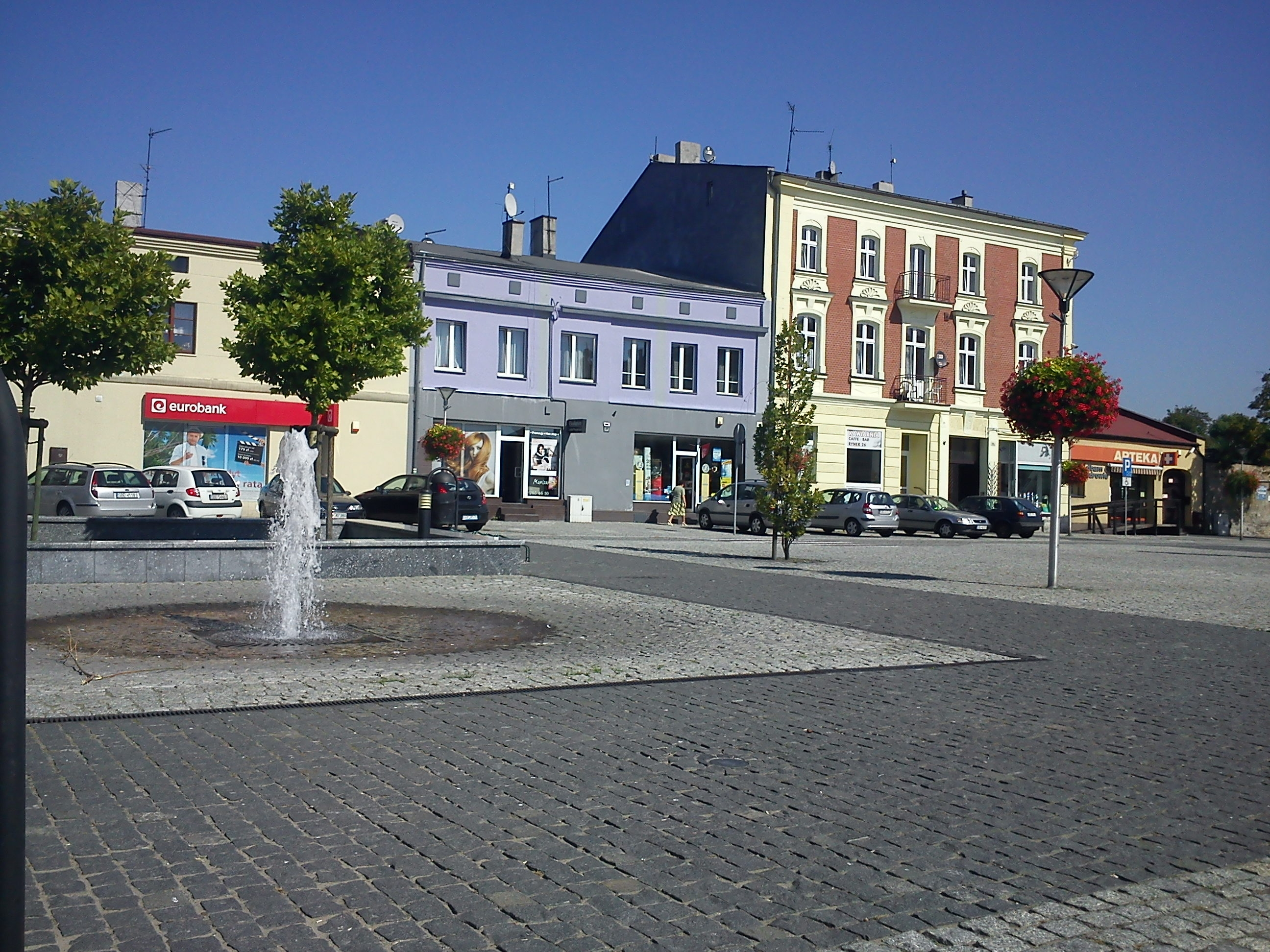 Czeladź-Rynek.JPG